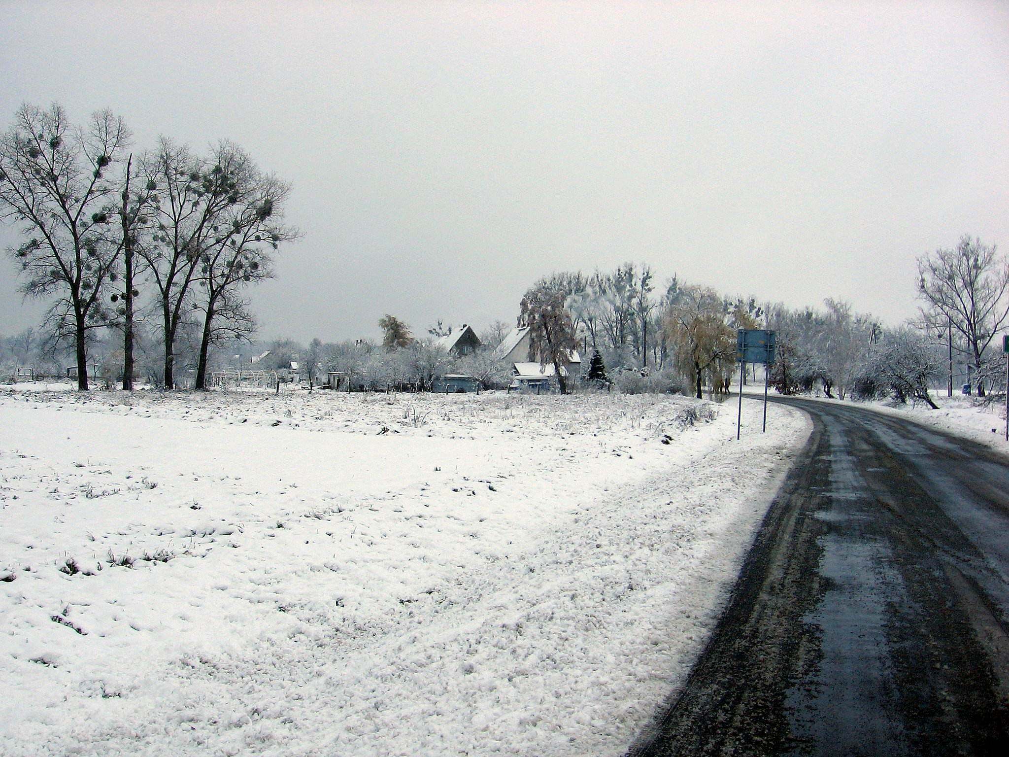 osiedle Mokra we Wrocławiu, widok z ul. Wińskiej róg Mojęcickiej